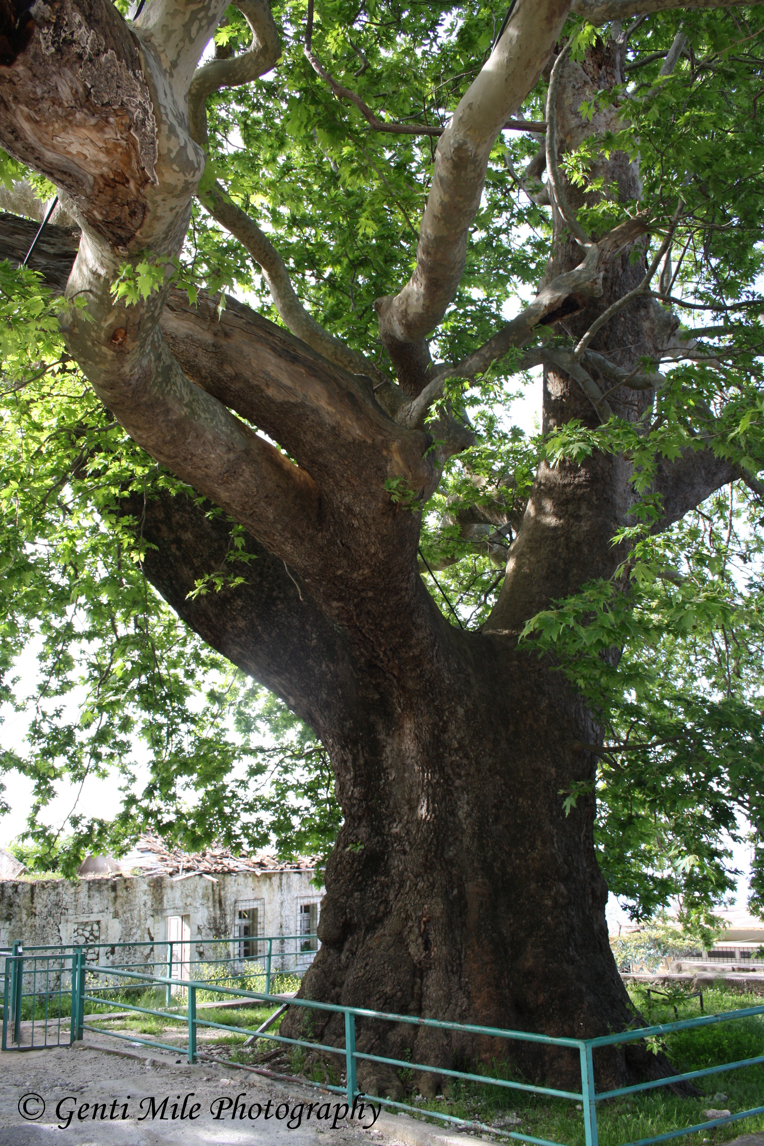 BioMonumente Nr., Shqiperi